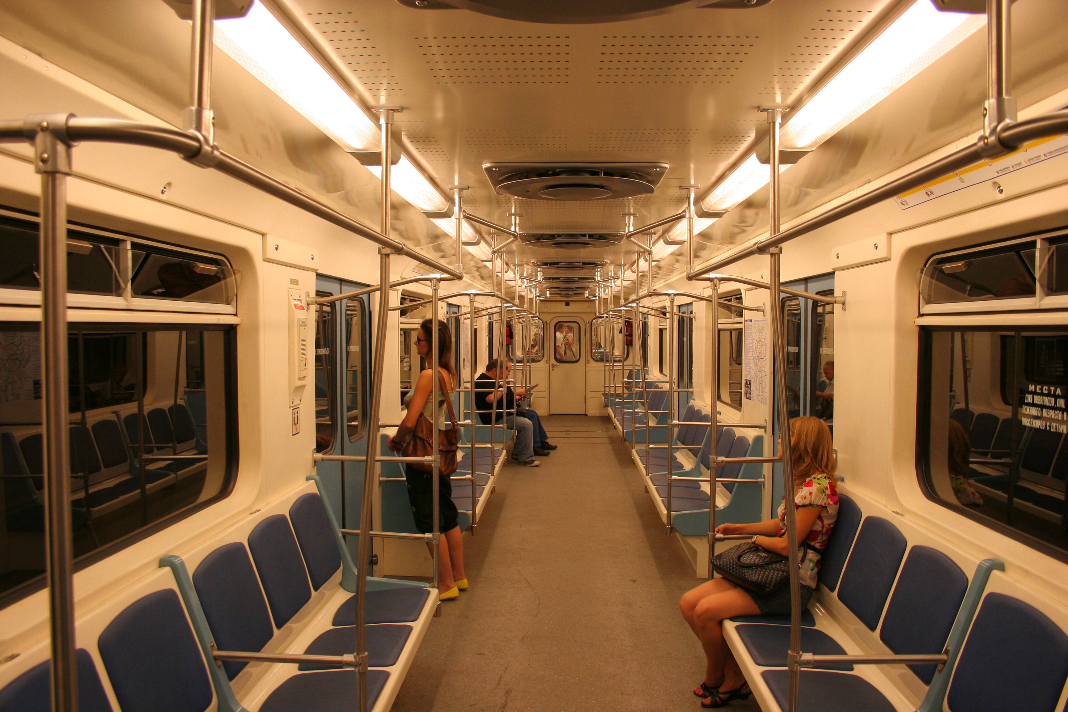 Ein Zug der Baureihe 81-717.6/714.6 in der Metro Moskau.